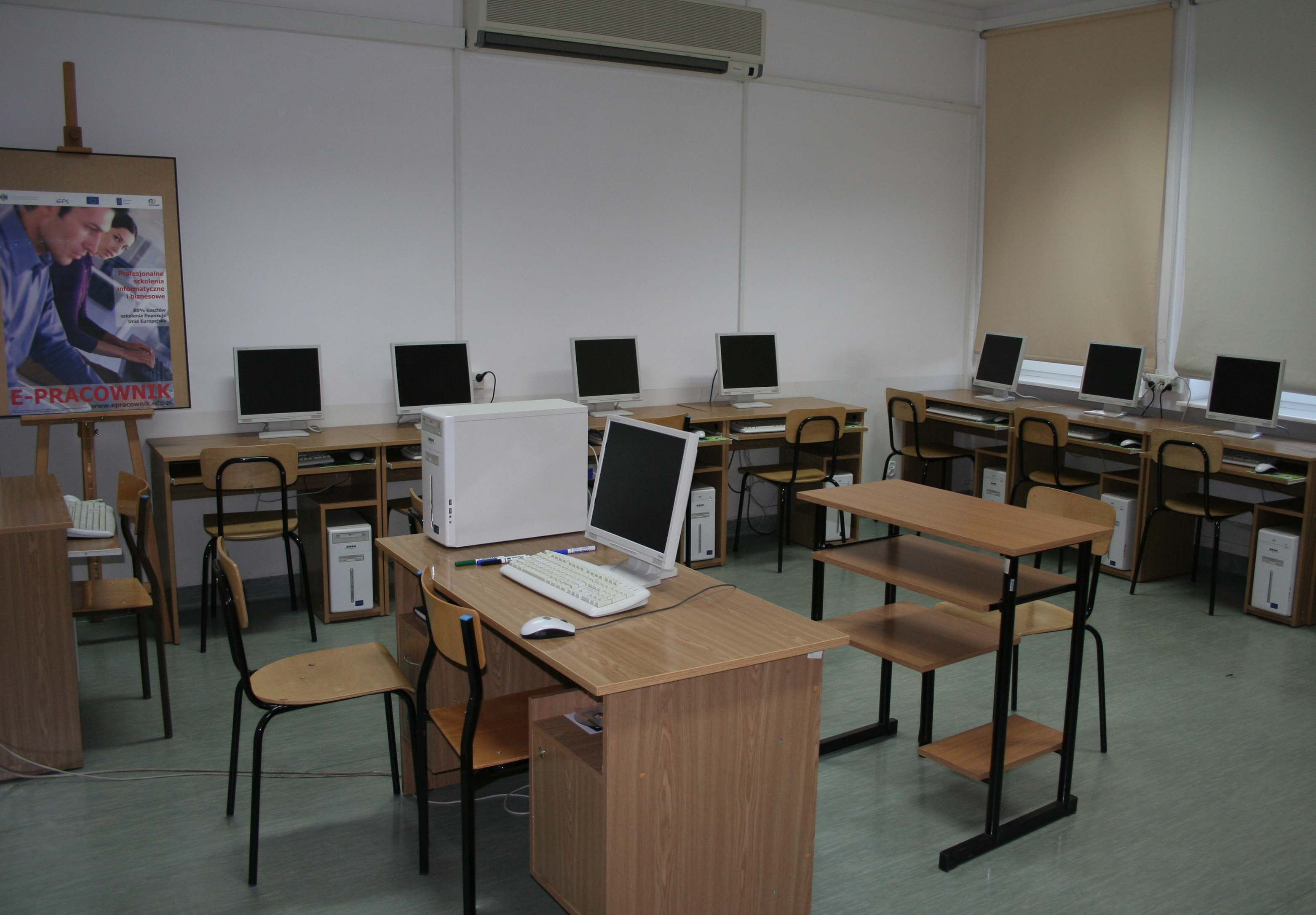 WSPA Lublin - jedna z pracowni komputerowych